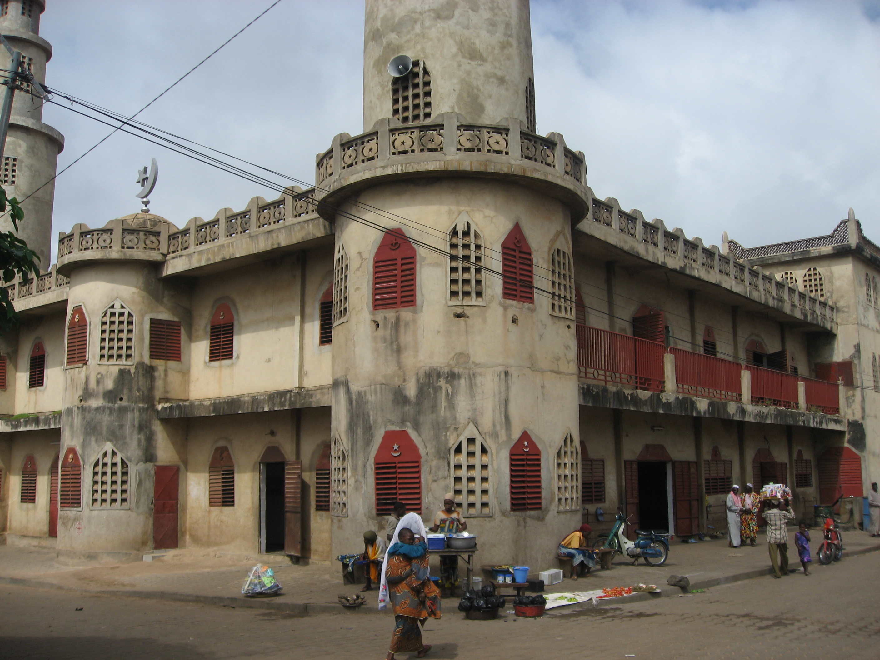 Parakou, Benin